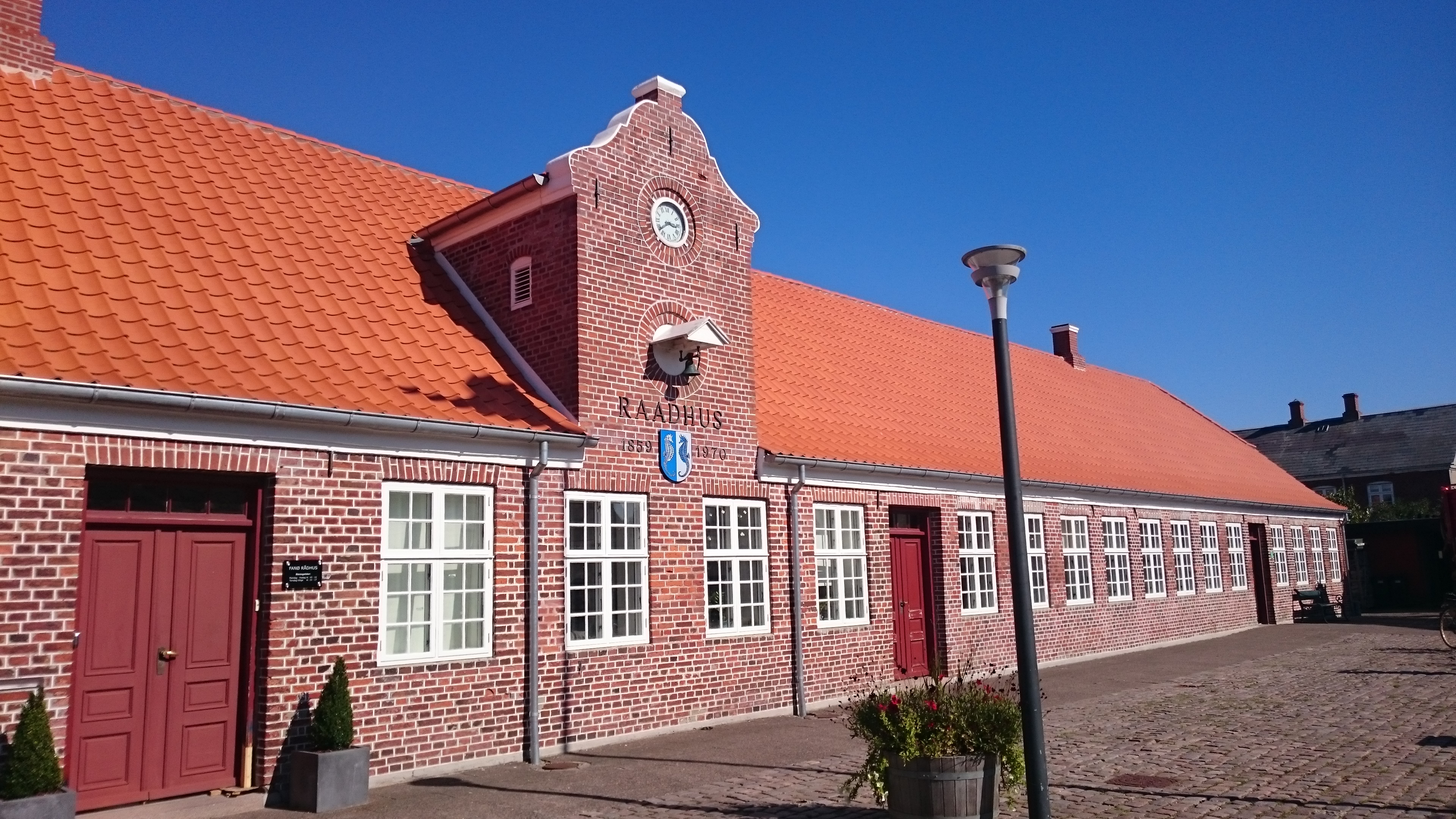 Nordby Borgerskole